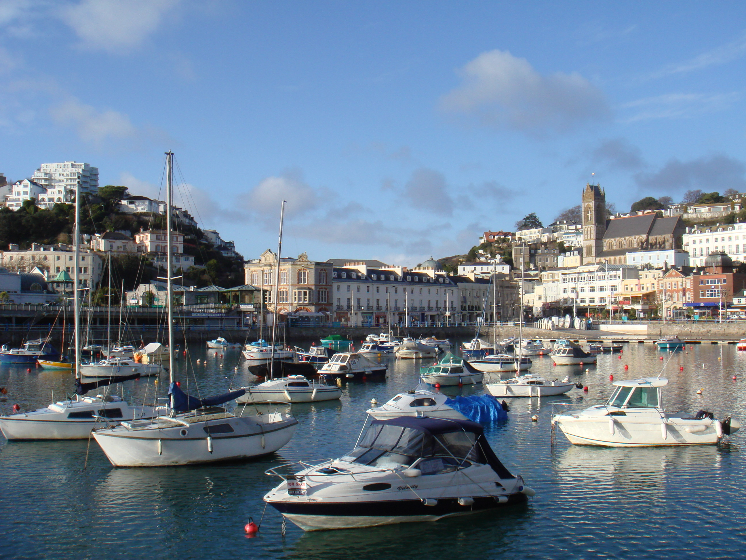 Hafen Torquay